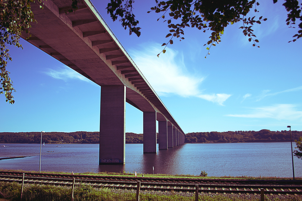 The Vejle Fjord Bridge in Denmark Plakat i A1 størrelse til salg! Photo of the Vejle Bay Bridge, taken from "Dyrehaven" ("The Animal Garden") A1-poster (841mmx594mm) for sale! Taget med Nikon D3100 18-55mm f/3.5-5.6 @ 27mm f/4.5 ISO 100 1/1250sek. [1]